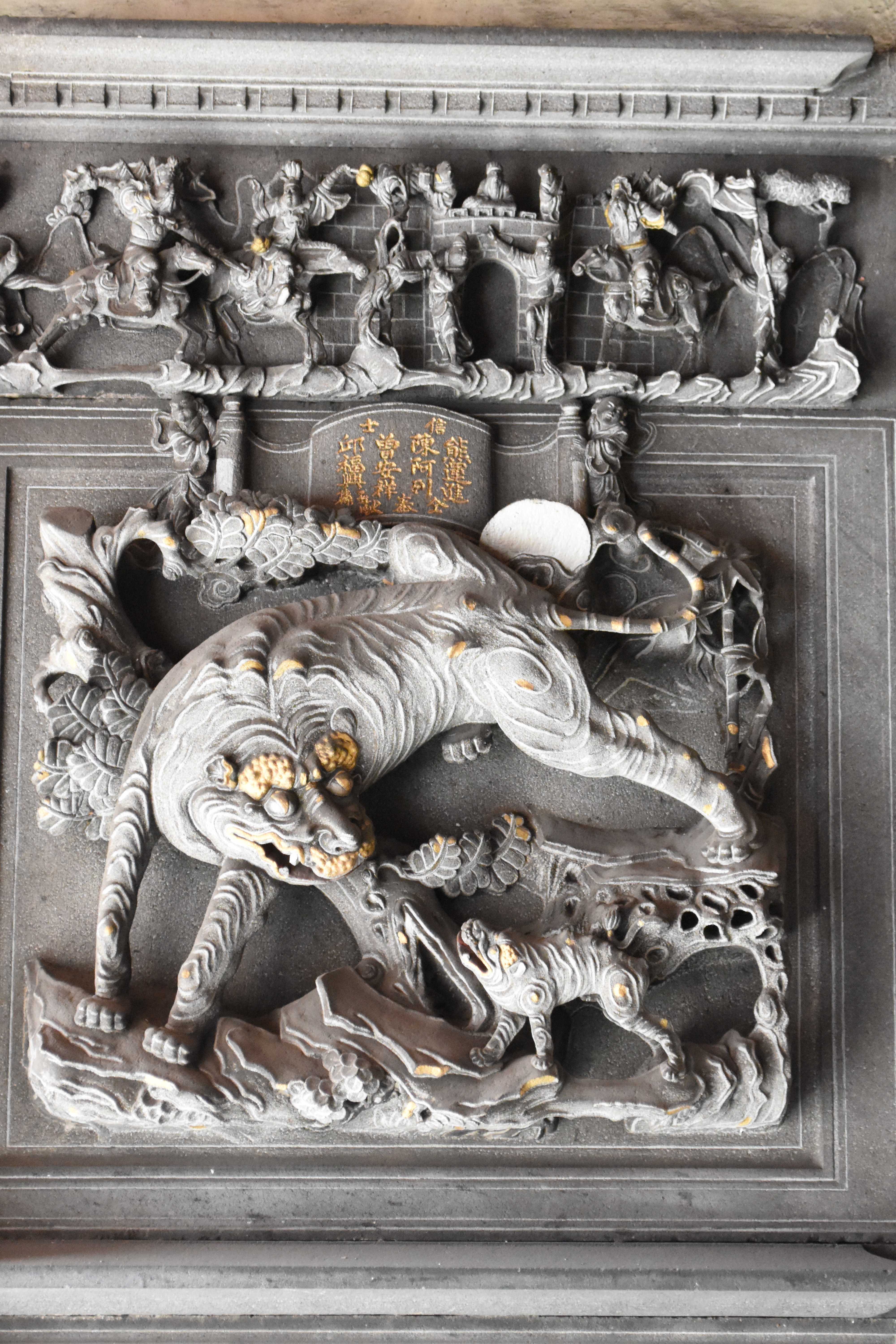 中文（台灣）: 中壢仁海宮7